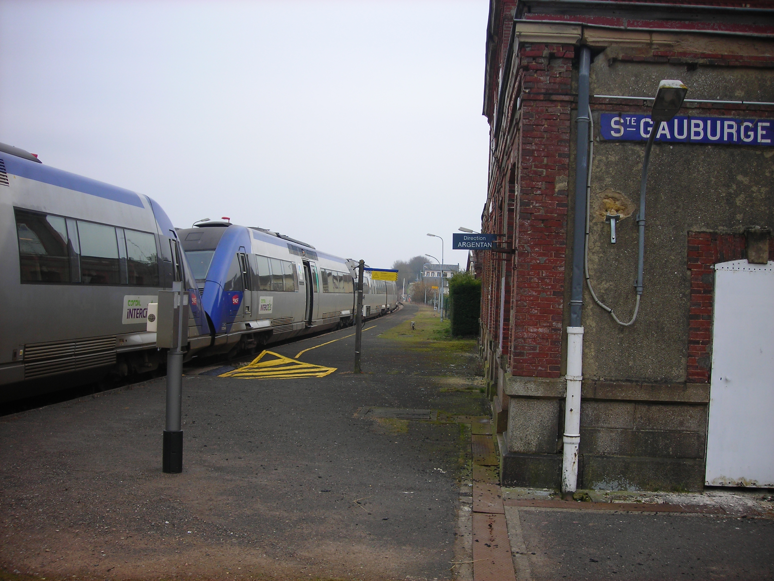 TER ou train Corail intercités en gare de Sainte-Gauburge-Sainte-Colombe